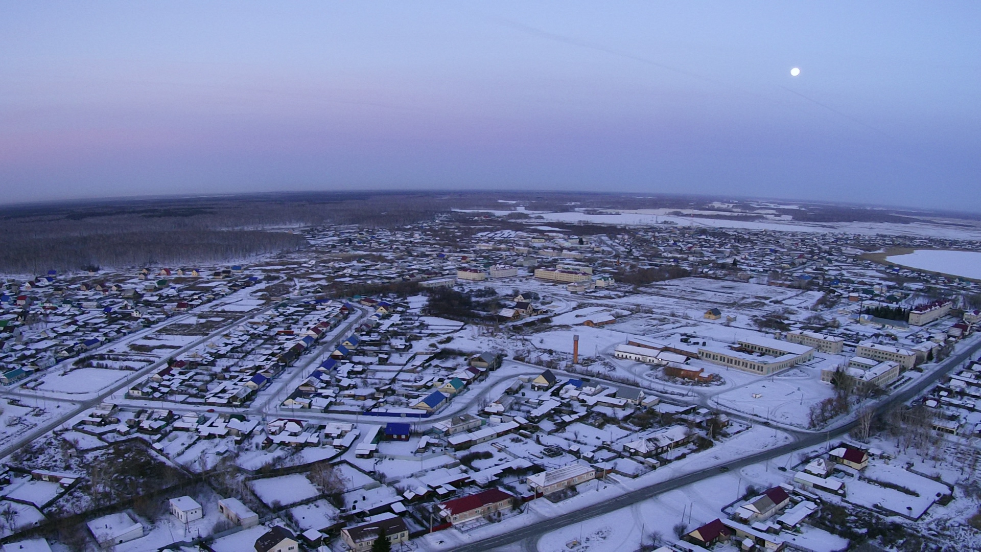 Вечерний поселок